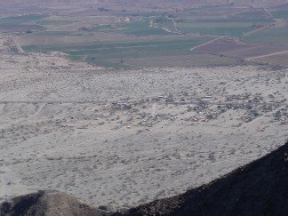 Colonia La Puerta Valle De Mexicali vista de la sierra cucapah